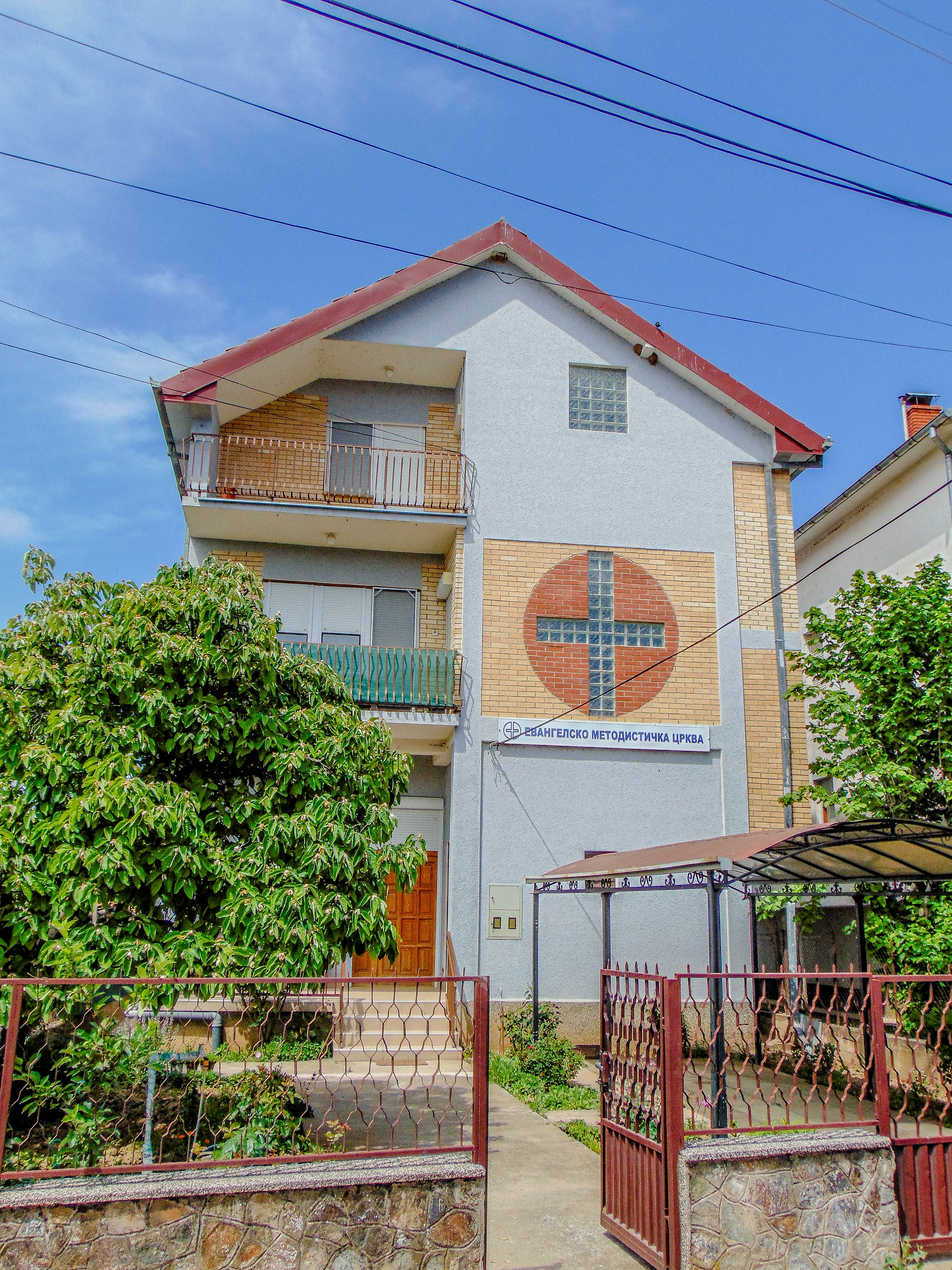 Евангелско-методистичка црква